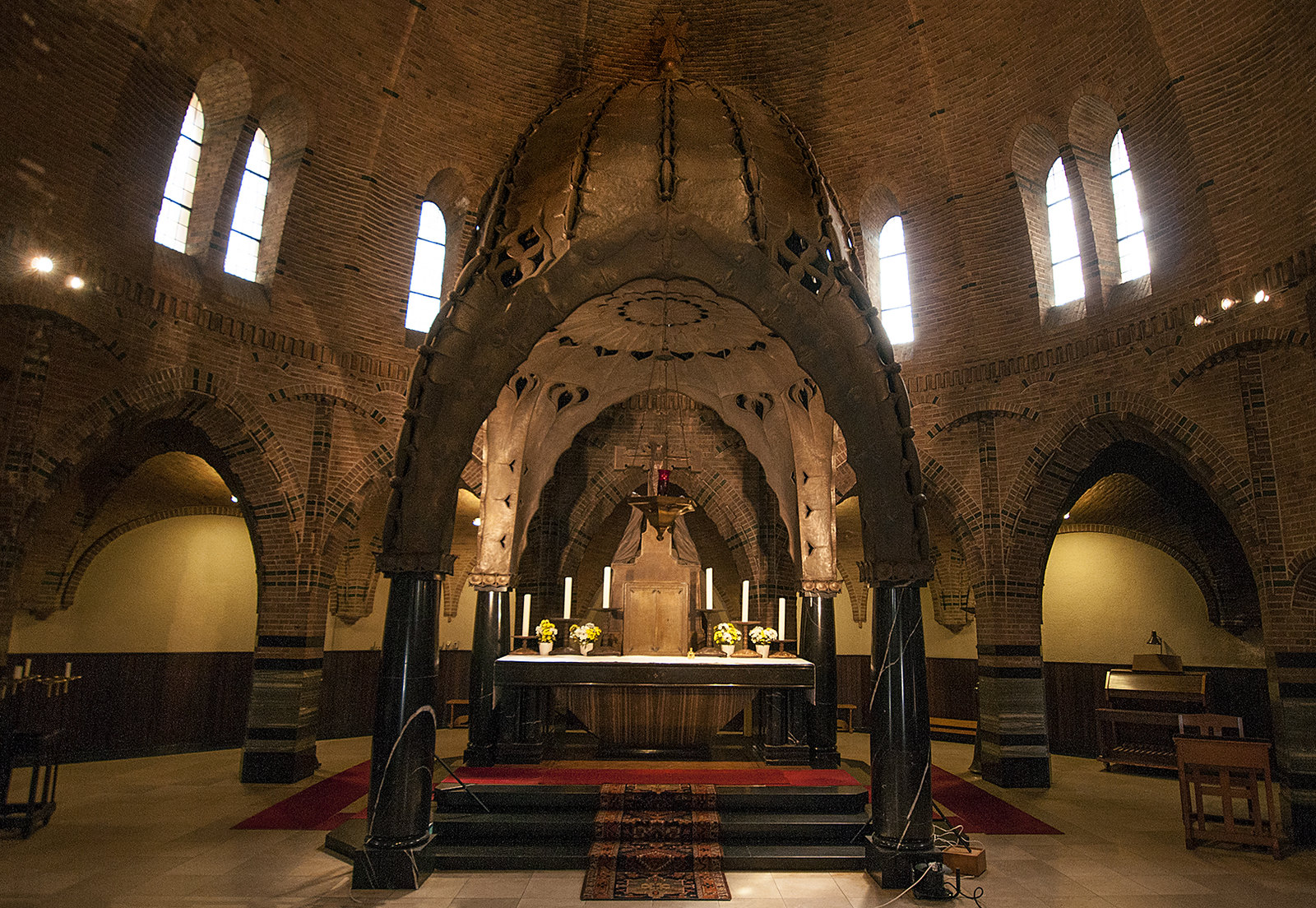 Ciborium en hoogaltaar Sint Jan Waalwijk